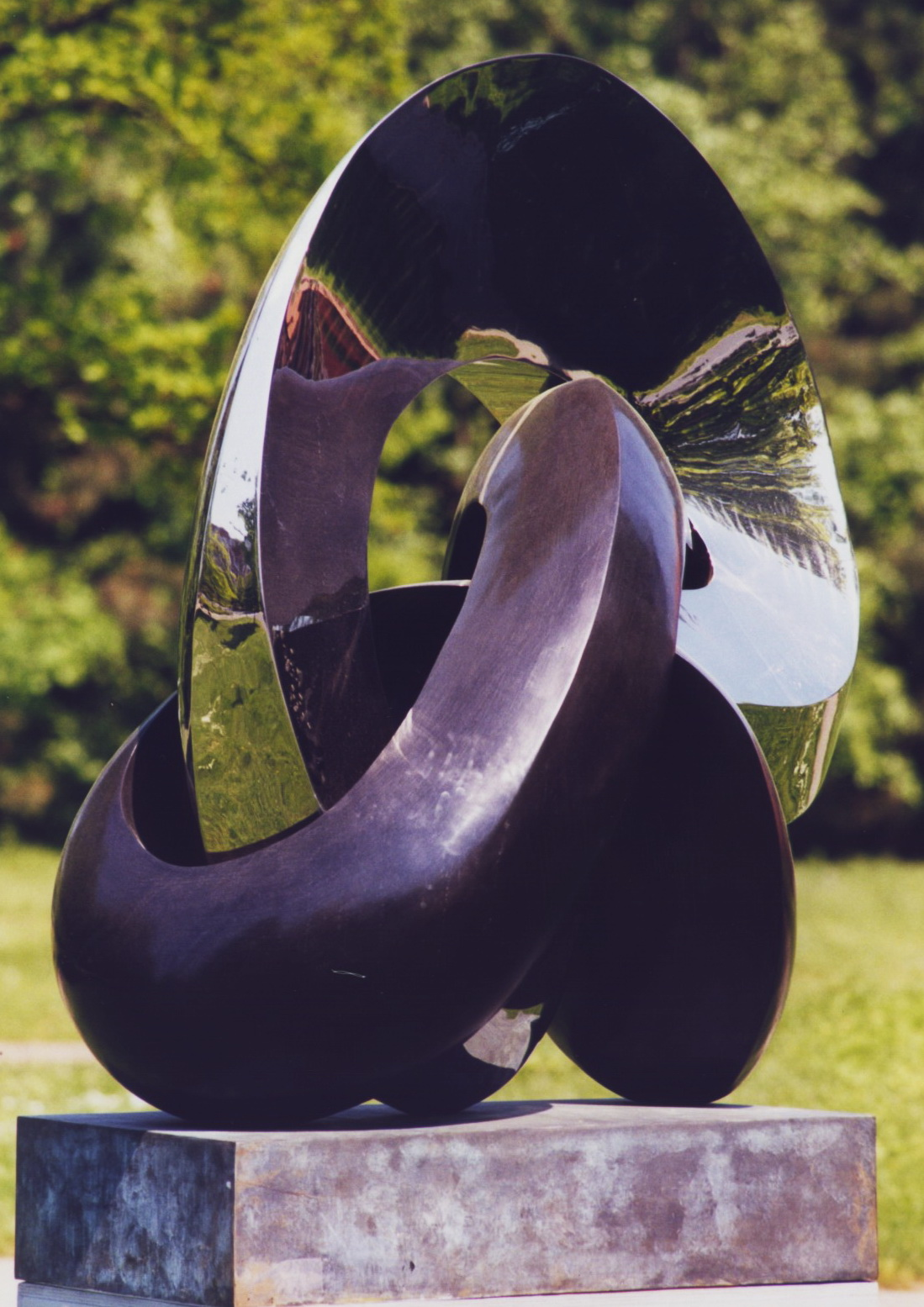 Graetz, Gidon: "Der Gordische Knoten". Stahl, Bronzeguss, 1981–1997